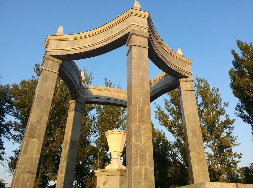 Wrocław, Cmentarz Oficerów Radzieckich, glorieta